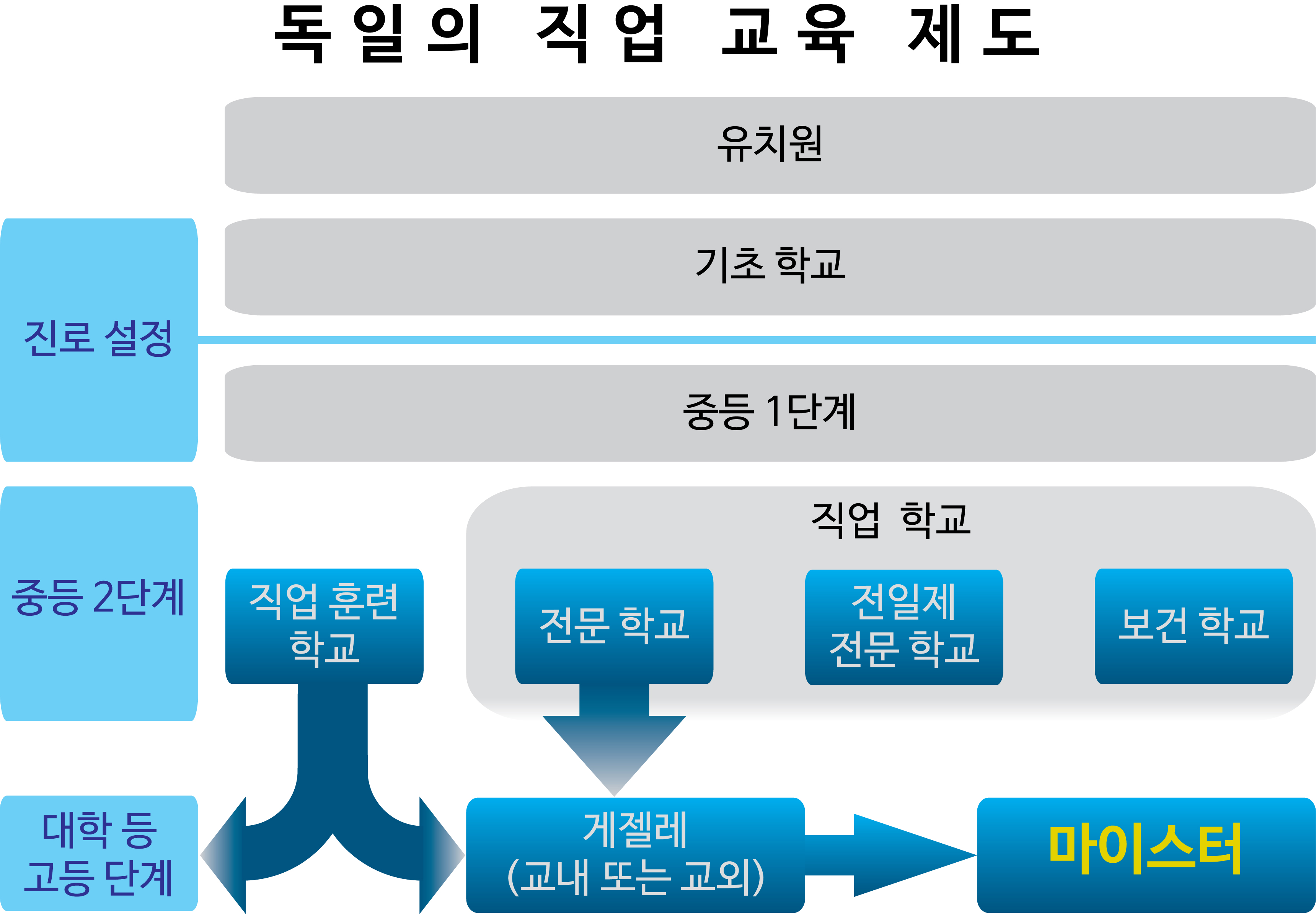 독일 국민이 공교육 하에서 시작해서 직업 교육을 받는 과정에 관한 개념도